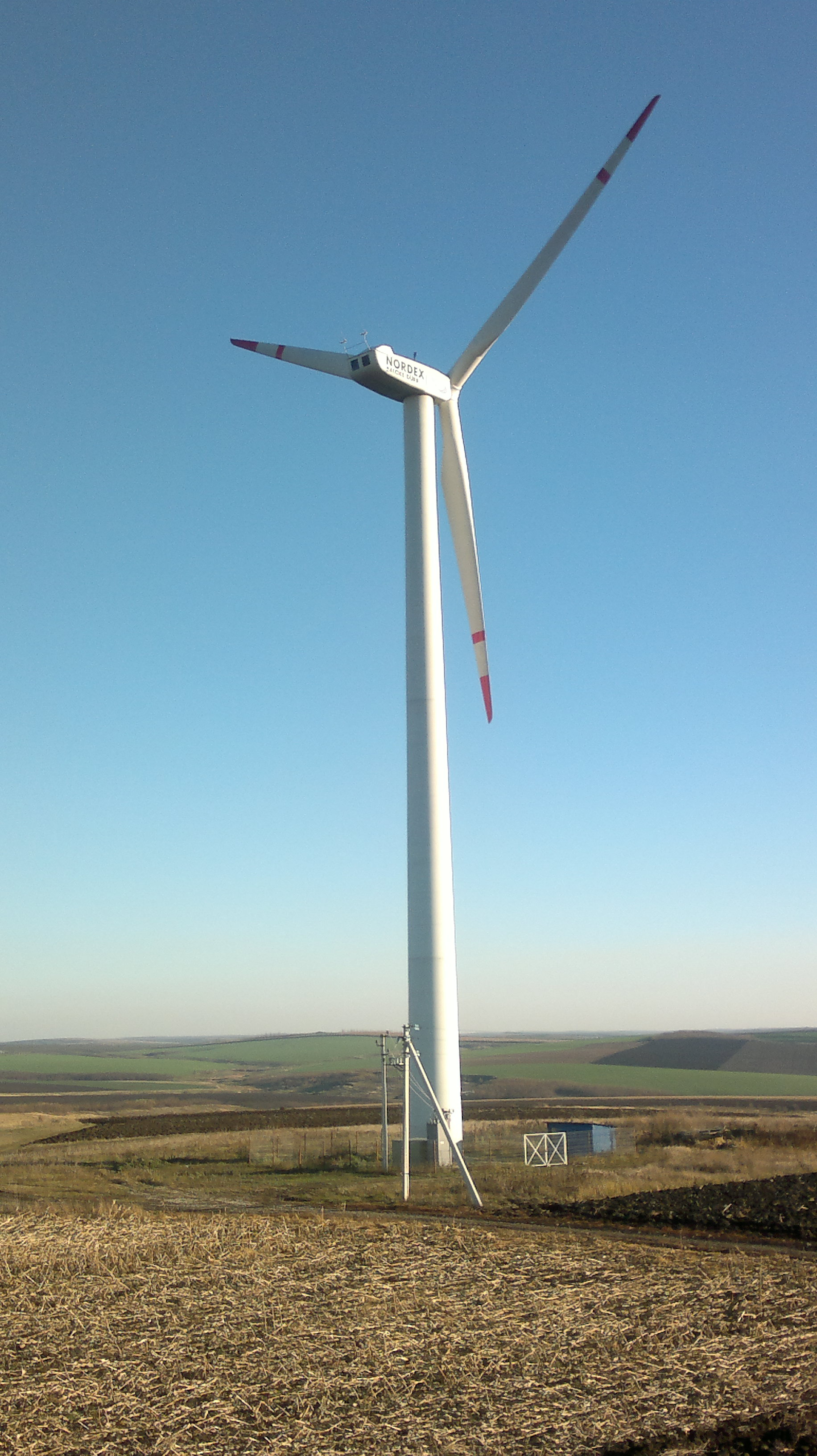 Centrală eoliană situată în nordul Republicii Moldova.